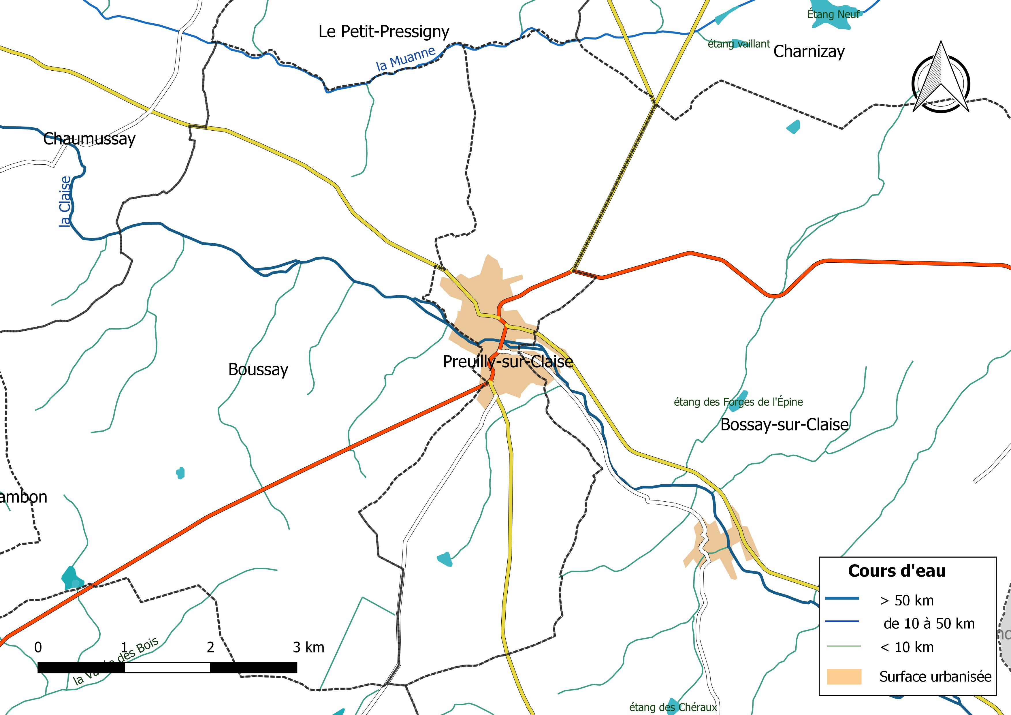 Carte du réseau hydrographique de la commune de Preuilly-sur-Claise (France).